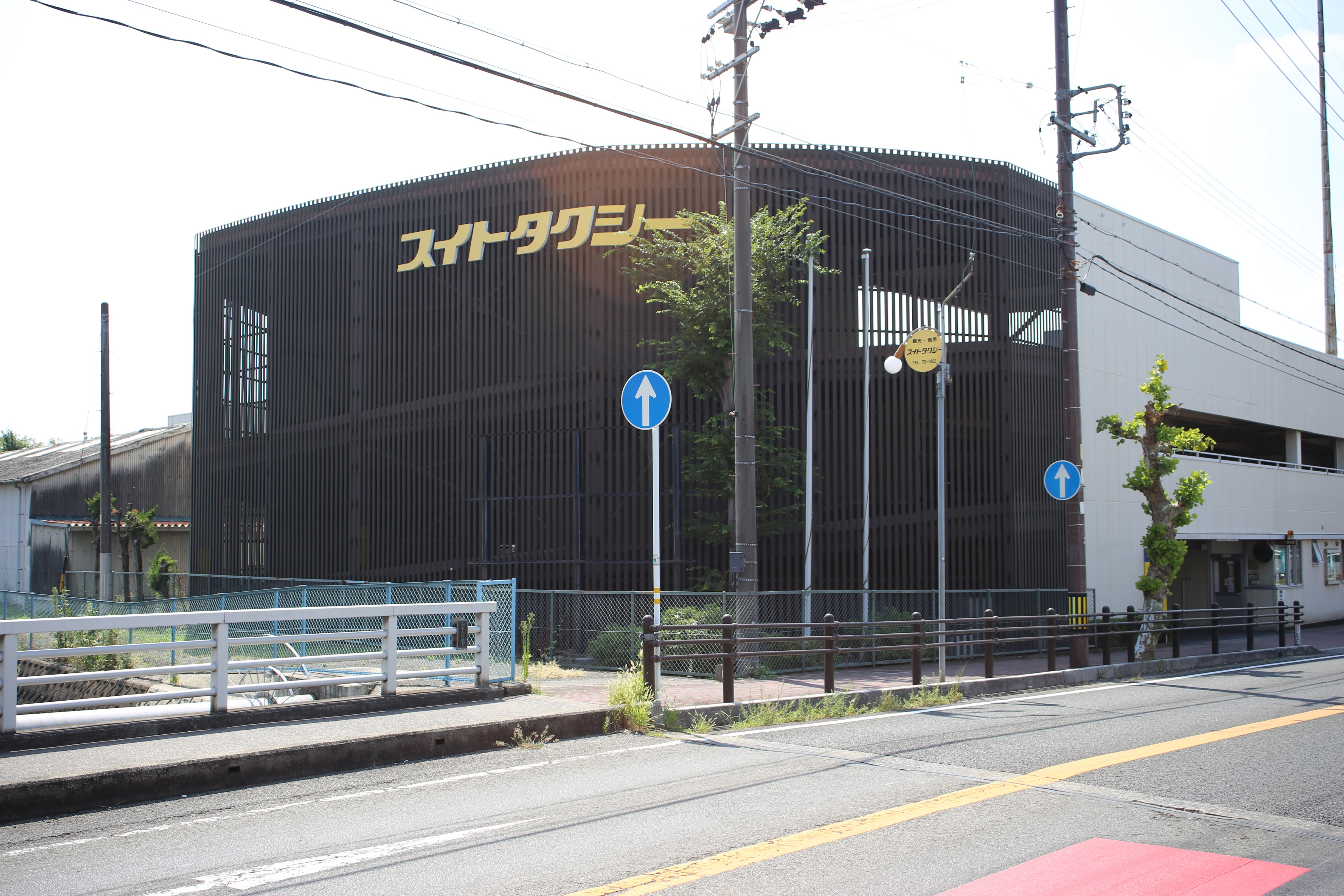 岐阜県大垣市旭町のスイトトラベル本社